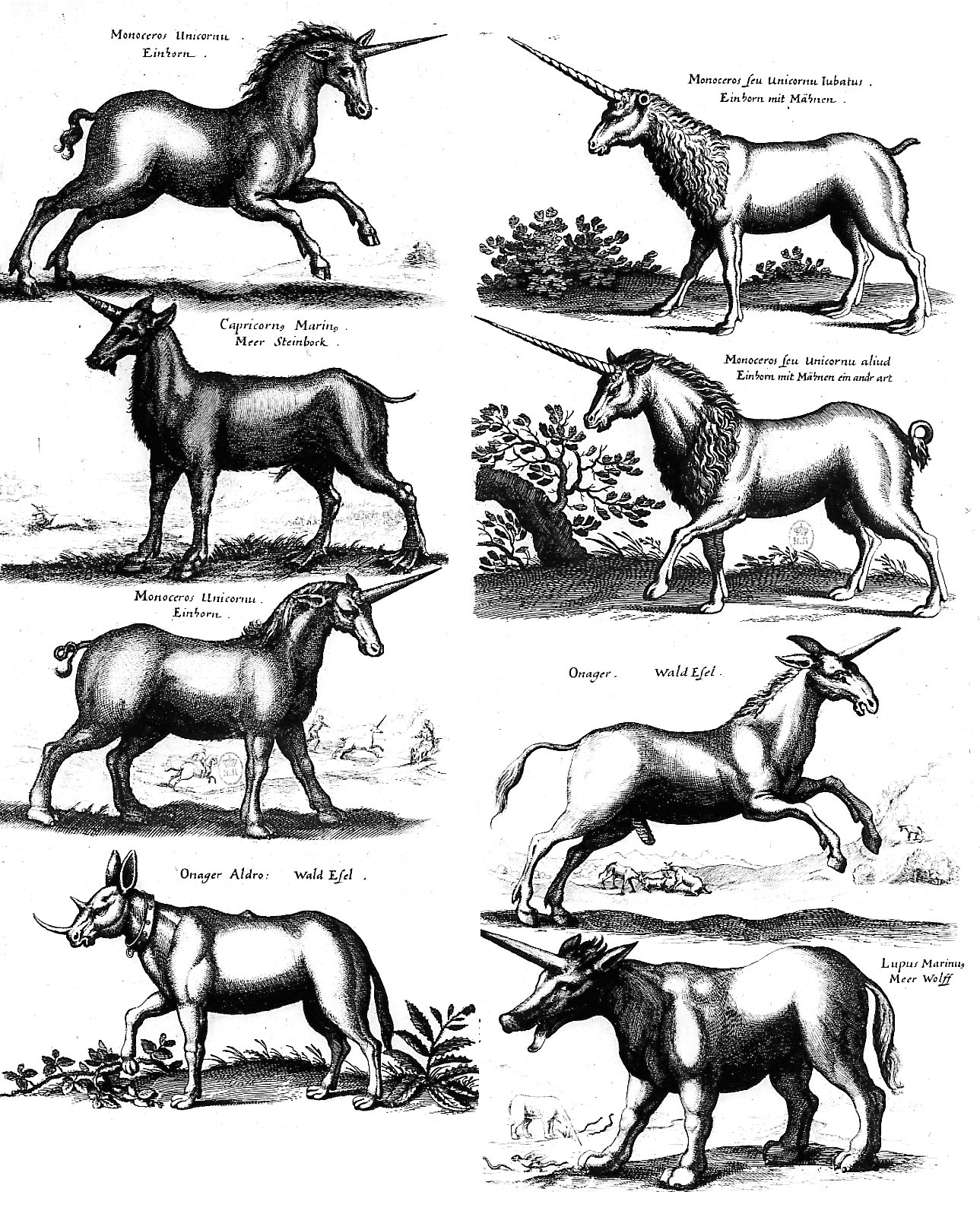 Les huit espèces de licorne mentionnées par Jon Jonston dans Historia Naturalis de Quadrupedibus, Amsterdam, 1652.